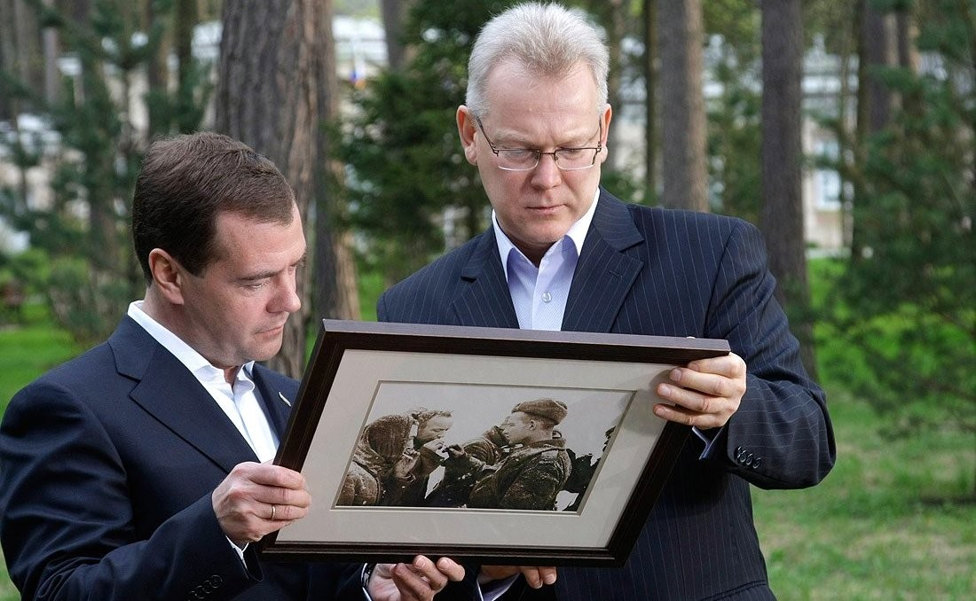 Перед началом интервью «Известиям». Главный редактор газеты Виталий Абрамов подарил Дмитрию Медведеву снимок фронтового корреспондента Павла Трошкина.